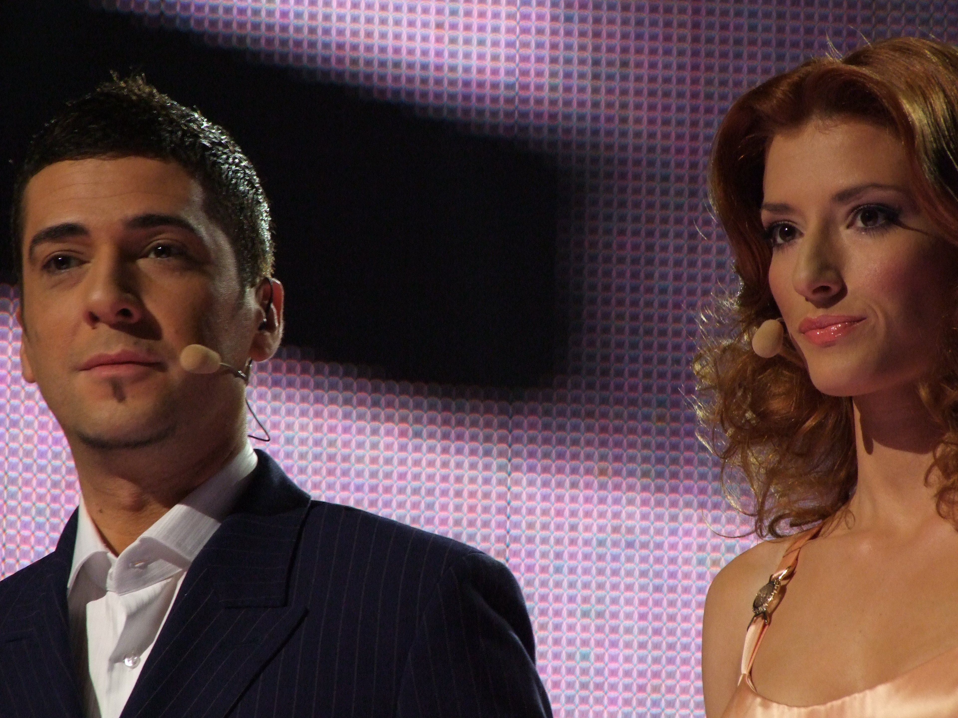 Semifinal 1 EUROVISION 2008